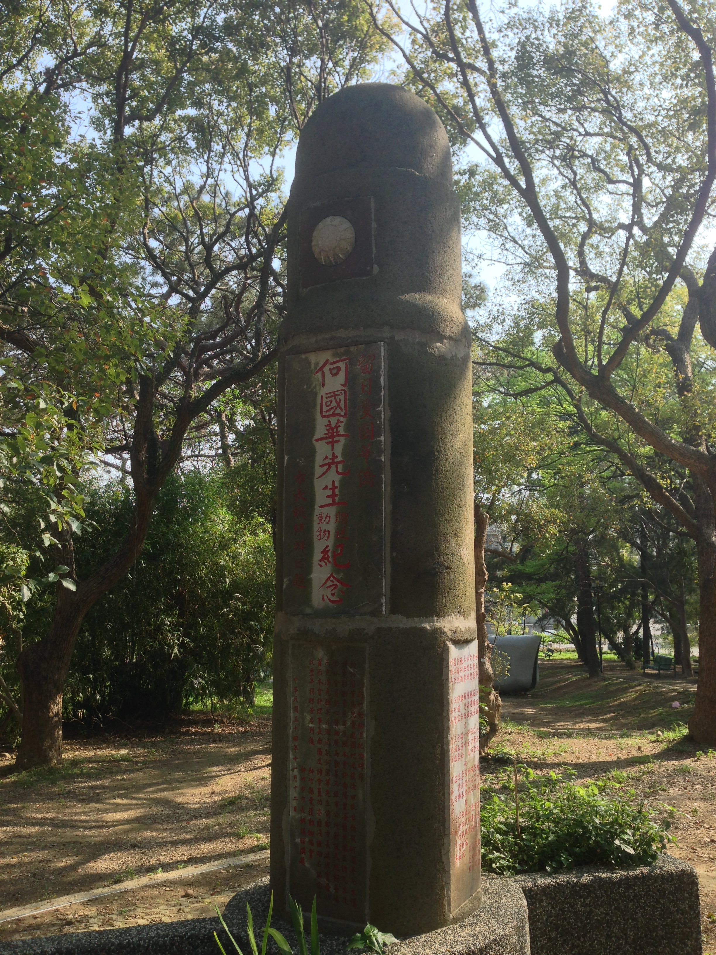 何國華先生贈送動物紀念碑